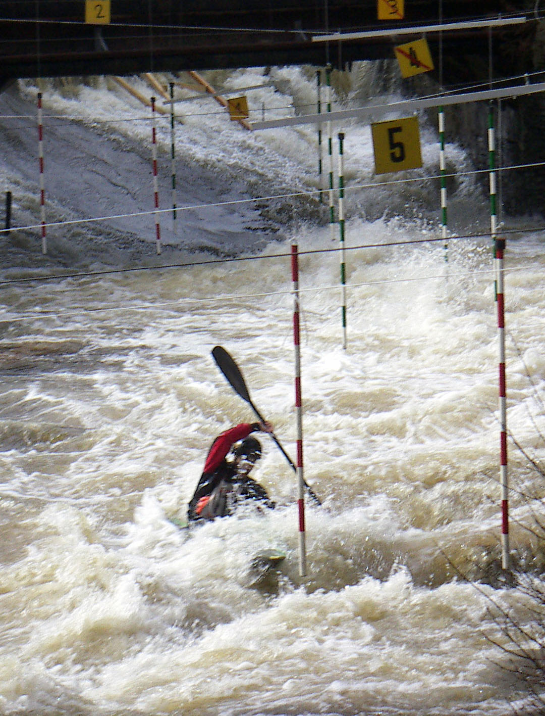 Slalom der Kanuten in Monschau am 25/26. März